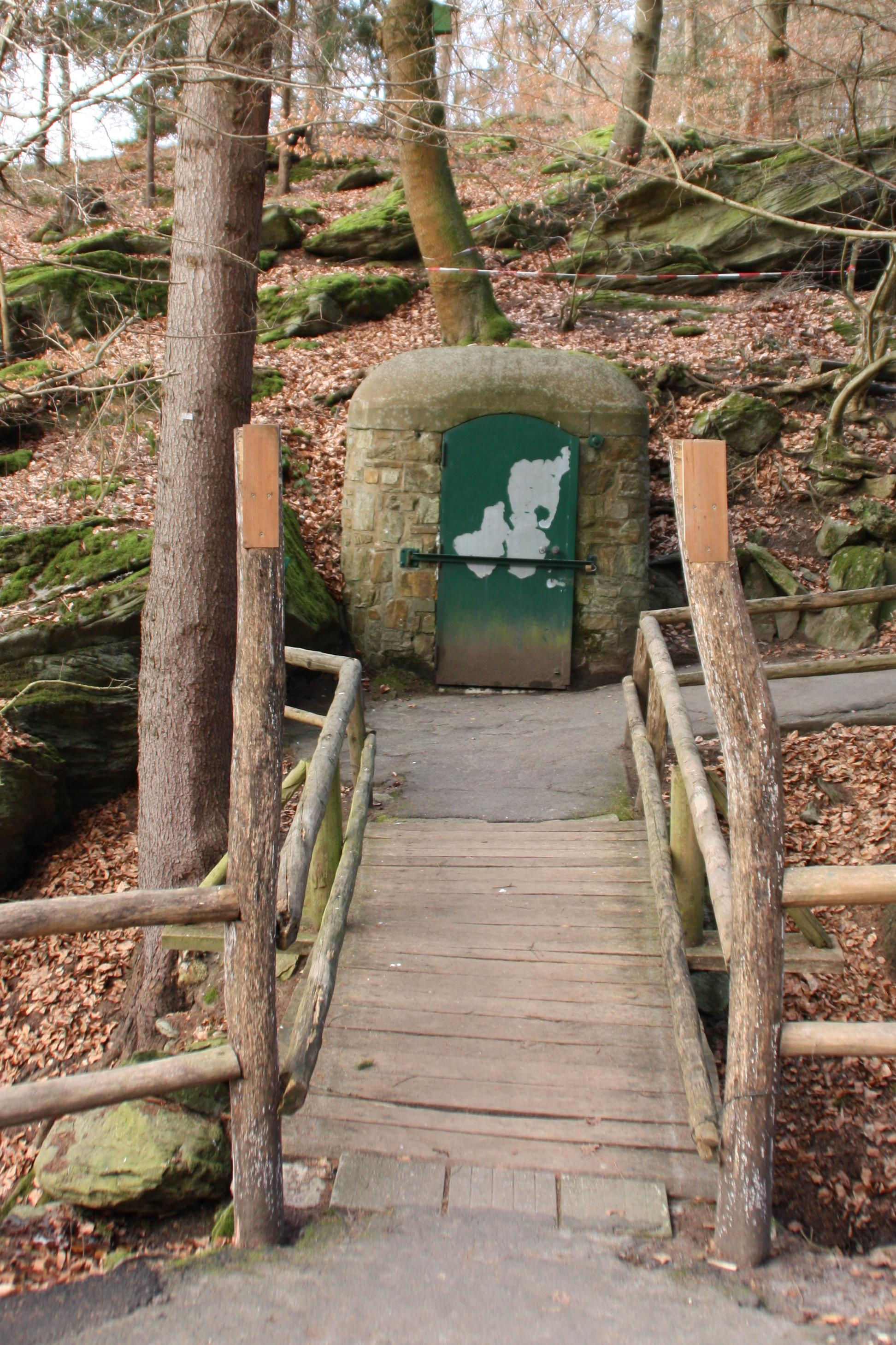 Zugangsbereich der Leichtweißhöhle in Wiesbaden, Hessen, Deutschland